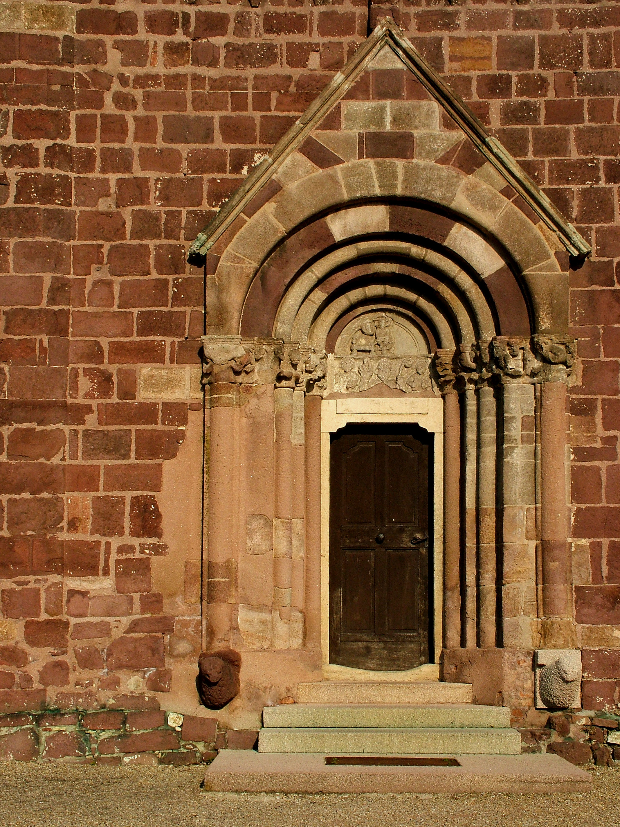 A felsőörsi Mária Magdolna-templom nyugati templomkapuja